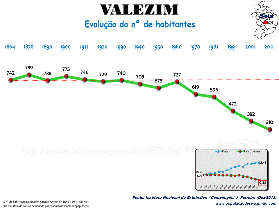 Evolução da População 1864 / 2011